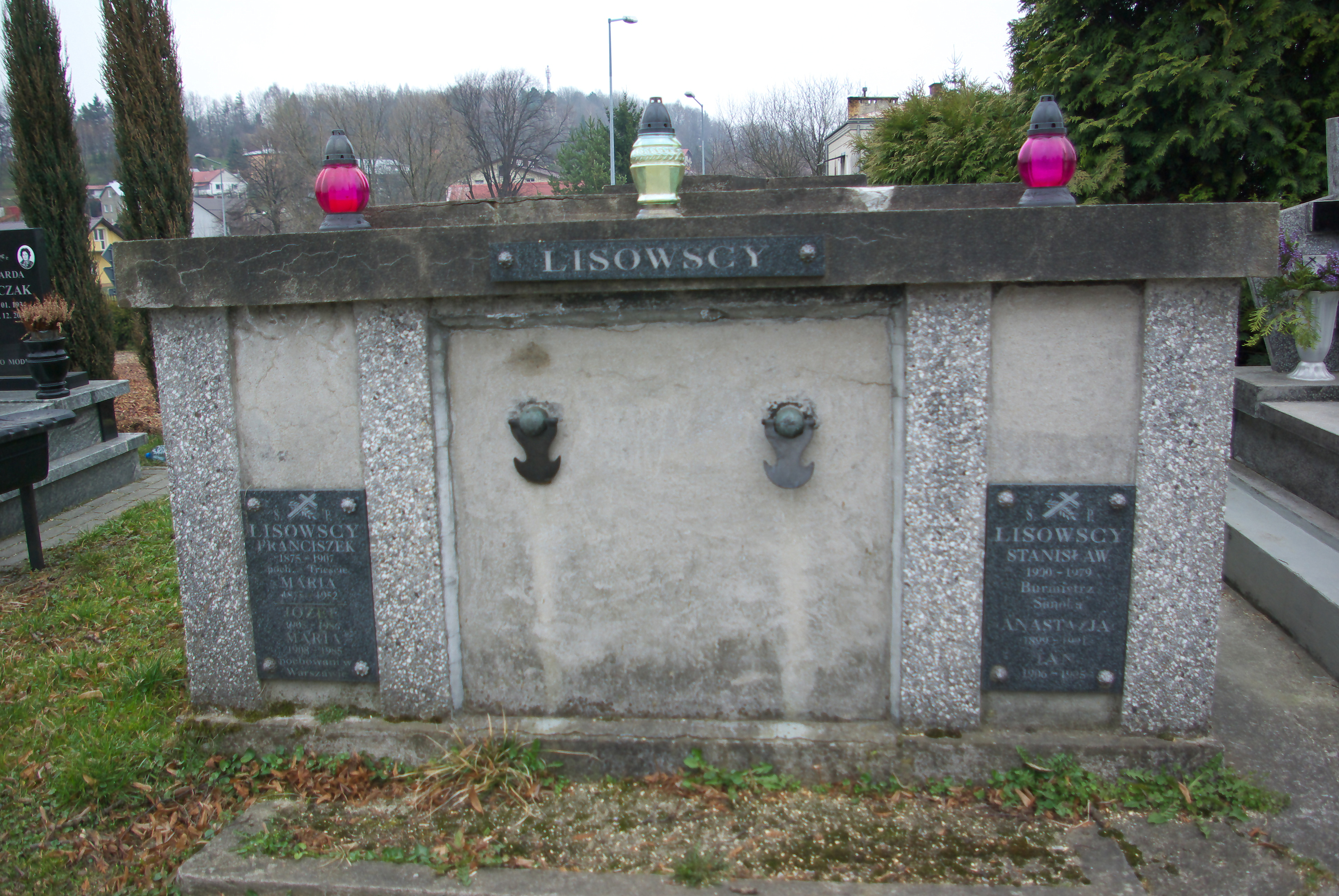 Grobowiec rodziny Lisowskich (Stanisław, Anastazja, Jan) na Cmentarzu Centralnym w Sanoku